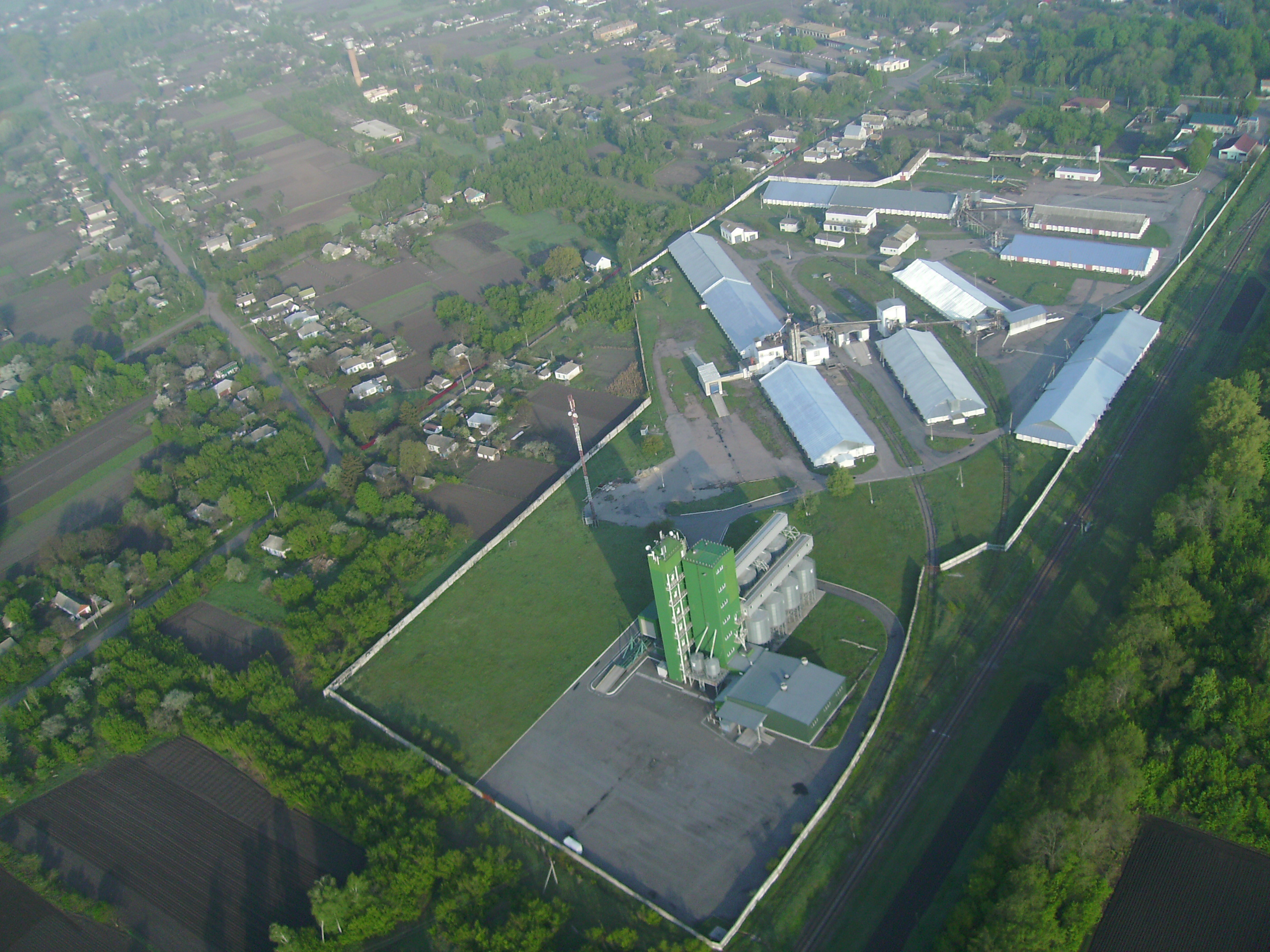 Дмитрівське зерно-переробне підприємство